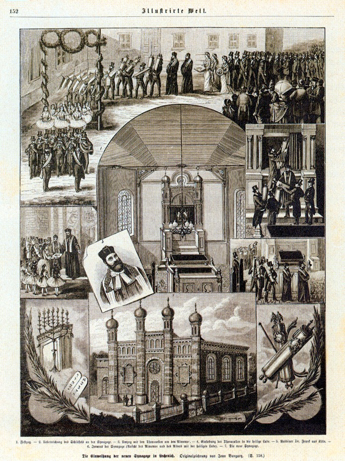 Einweihung der Synagoge in Lechenich, Zeichnung von Jean Bungartz, Sammlung Frank Bartsch Bliesheim